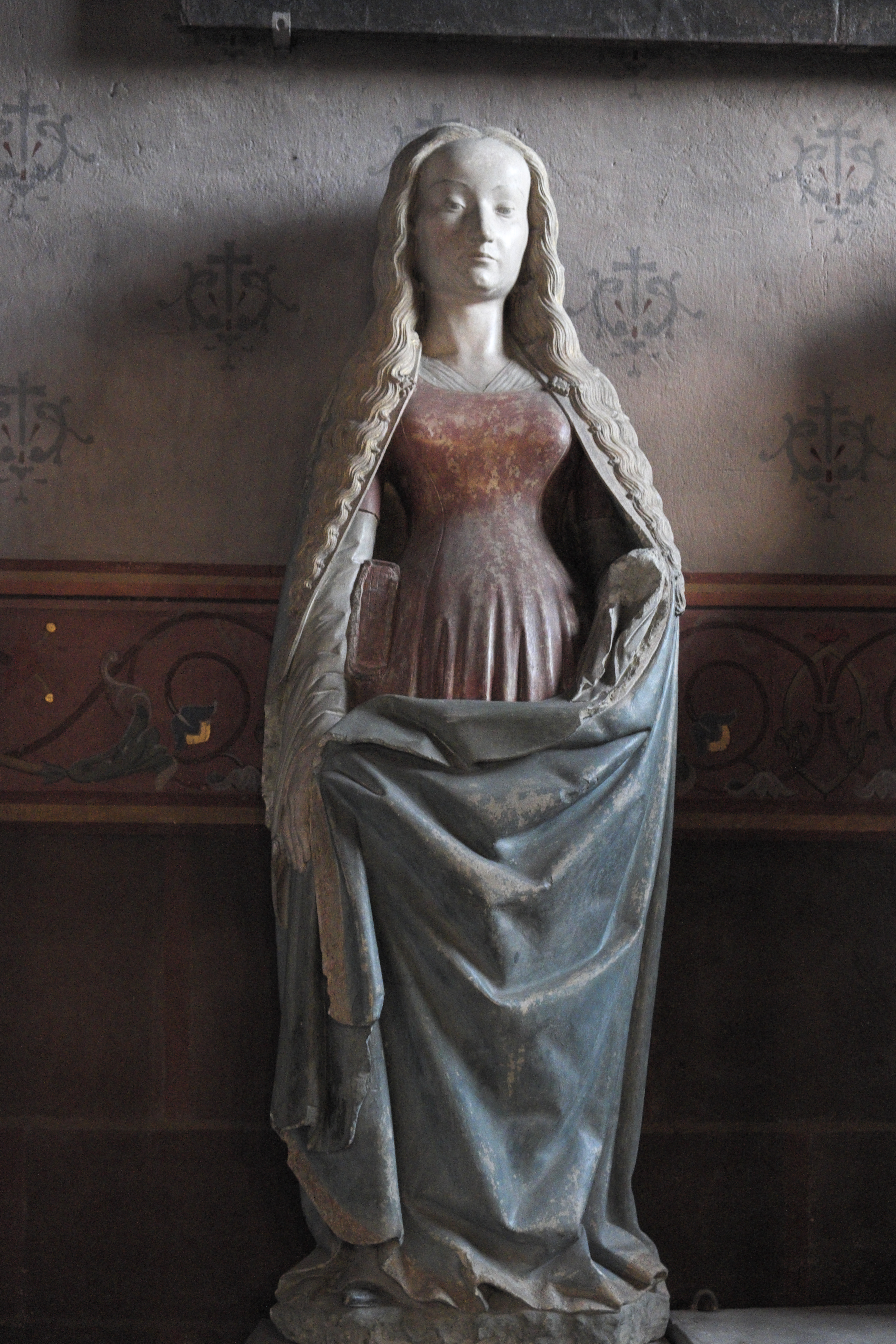 Katholische Kirche Saint-Pierre in Yzeure im Département Allier (Auvergne-Rhône-Alpes/Frankreich), heilige Agnes aus dem 15. Jahrhundert